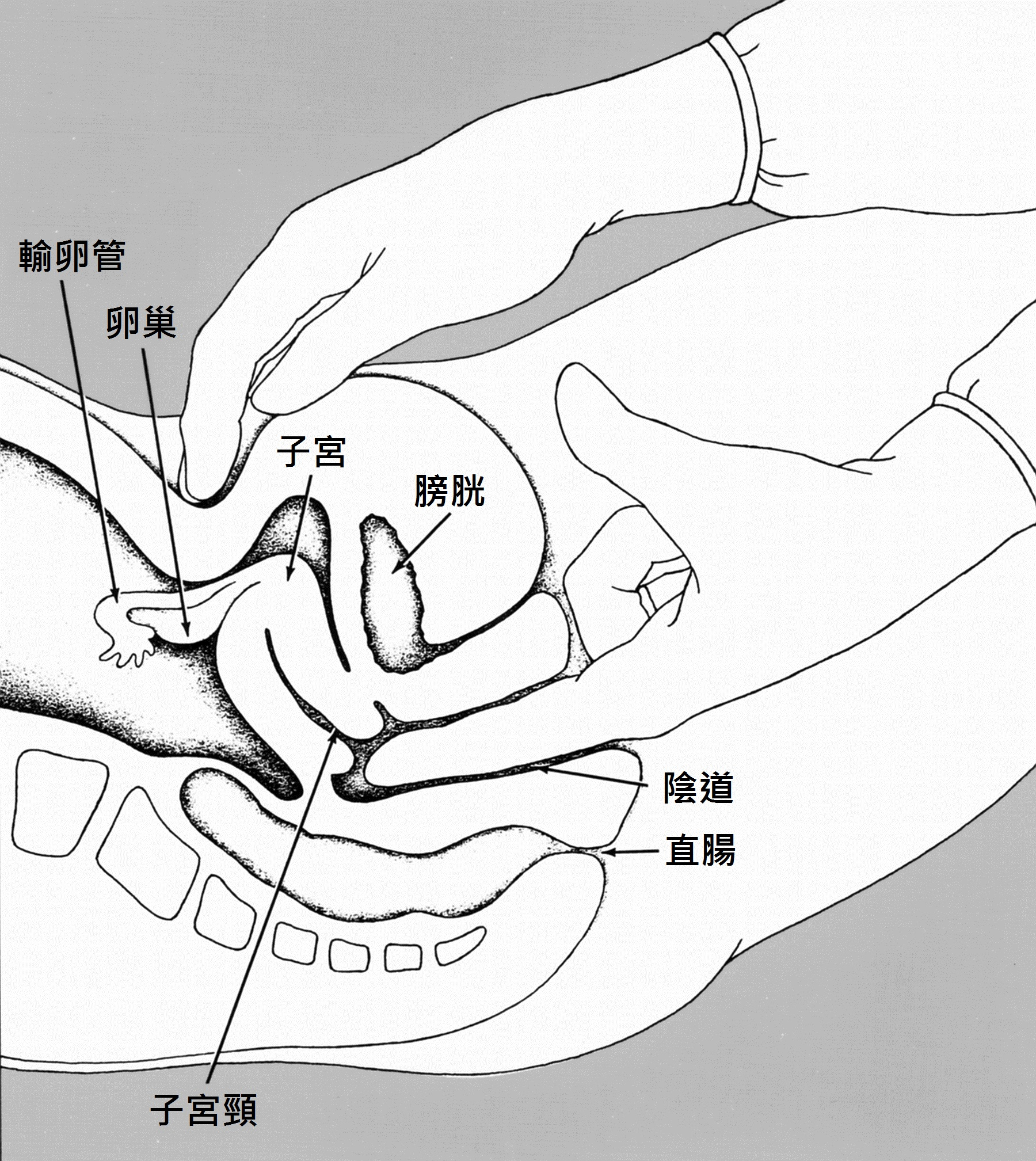 內診可能會檢查到的部位